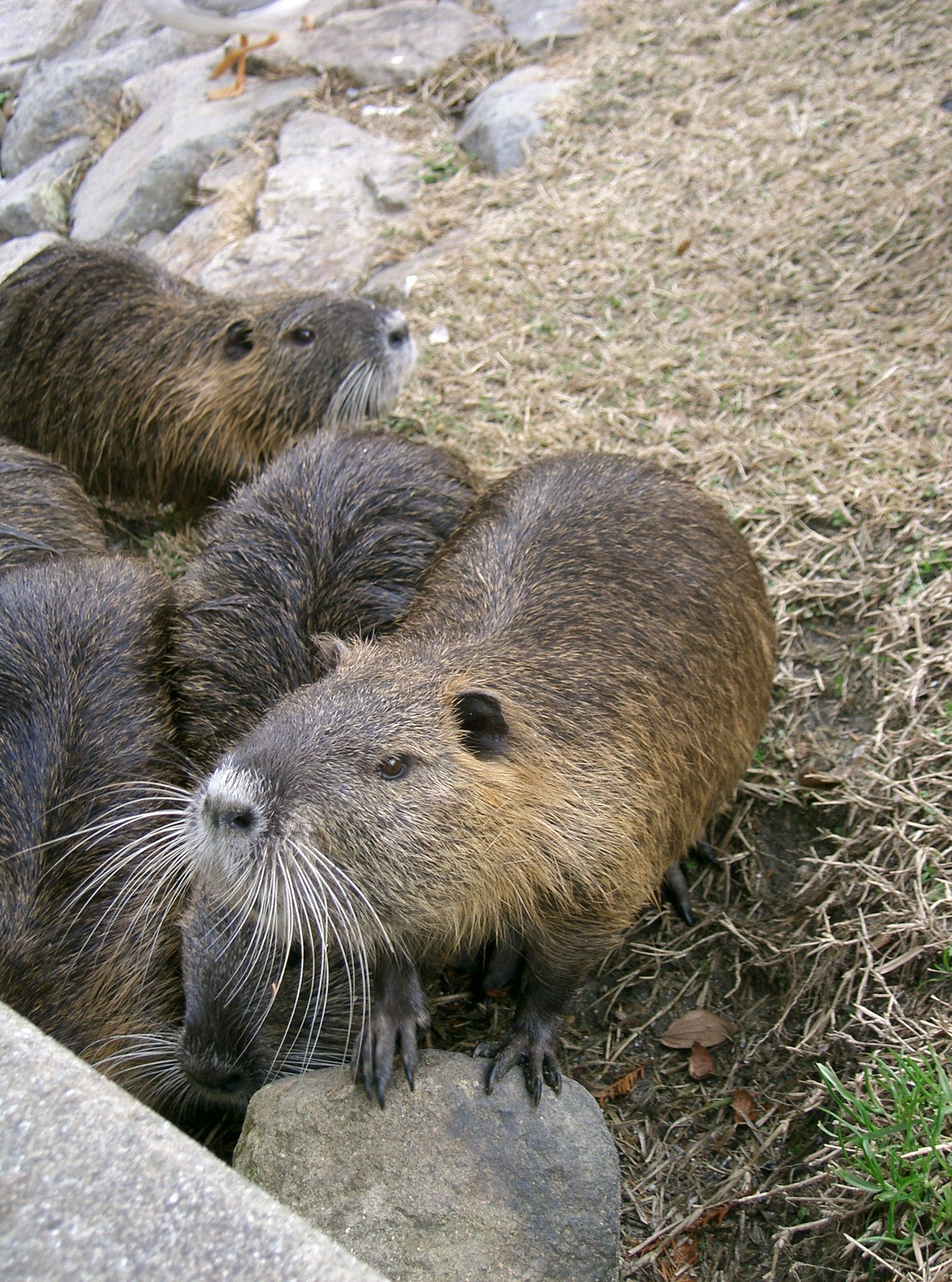 Myocastor coypus